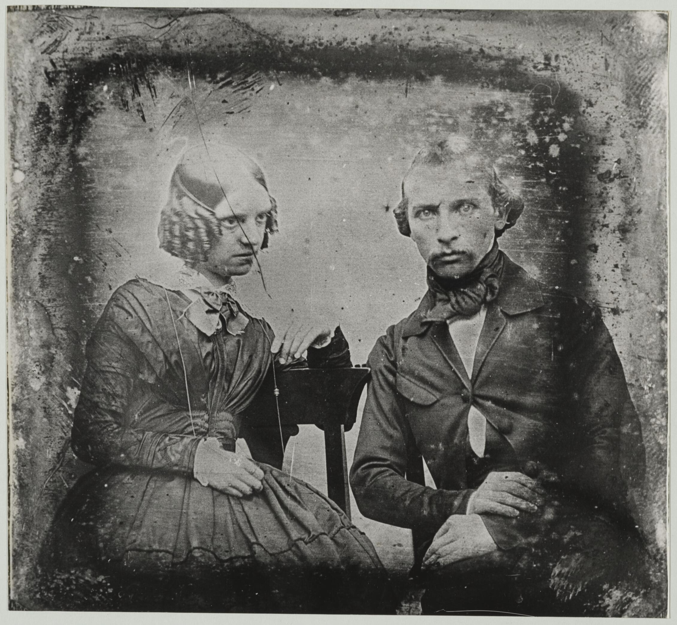 Dubbelportret van architect Carl Weber (1820-1908) en zijn vrouw Emily of Stratford (....-1850). Ze zijn zittend gefotografeerd, Weber in de camera kijkend, Stratford wegkijkend. Volgens het Brabants Historisch Informatie Centrum is de foto genomen in 1850 enkele uren na het vroegtijdig overlijden van Emily. Haar ledematen werden in positie gehouden met draden en haar ogen werden opengehouden met behulp van stokjes.